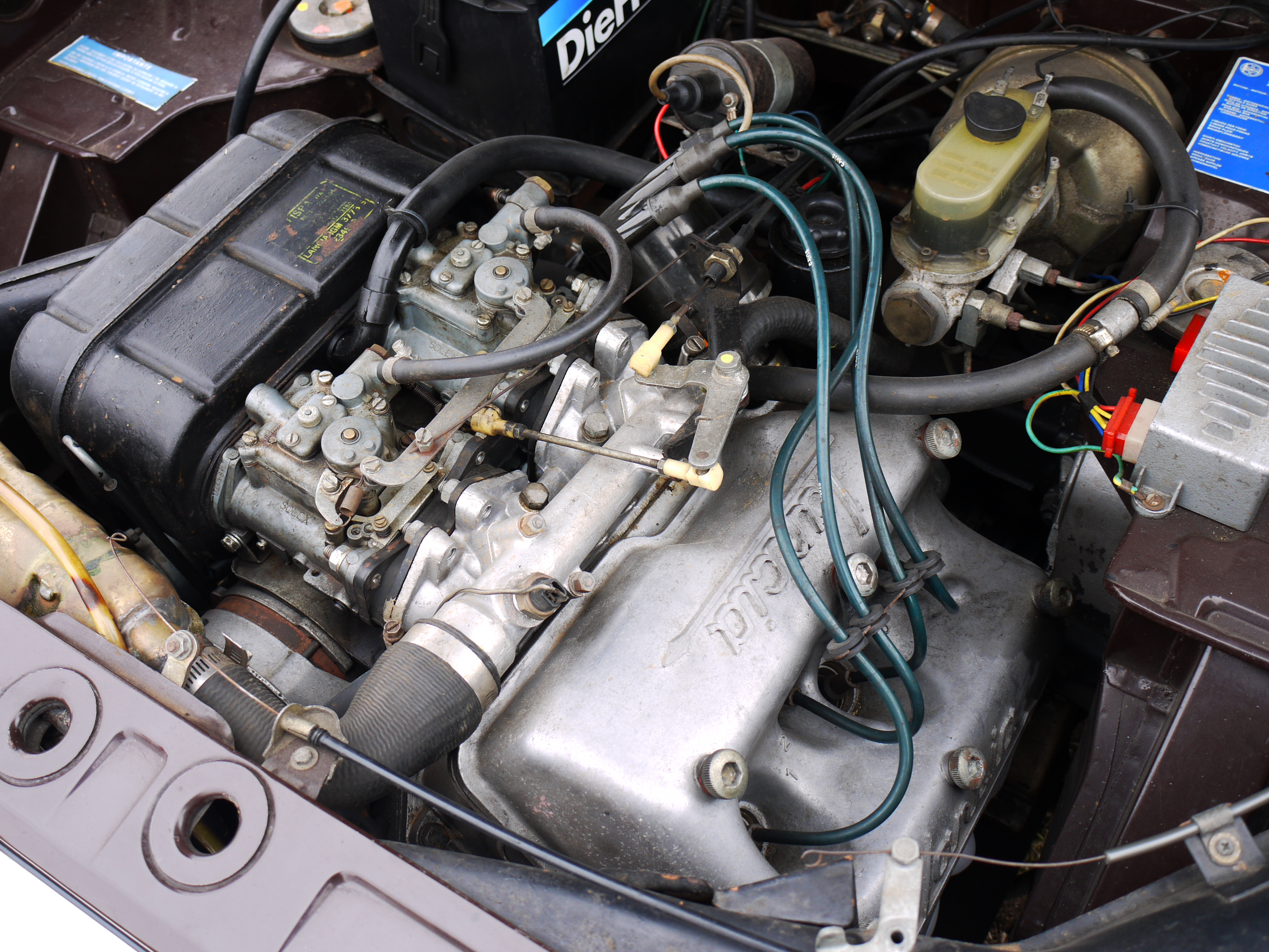 Lancia Fulvia engine 2009 Alameda All Italian Car & Motorcycle Show